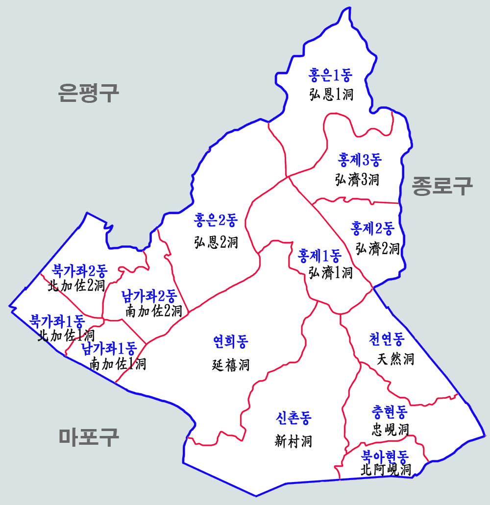 서울시 서대문구 행정구역도